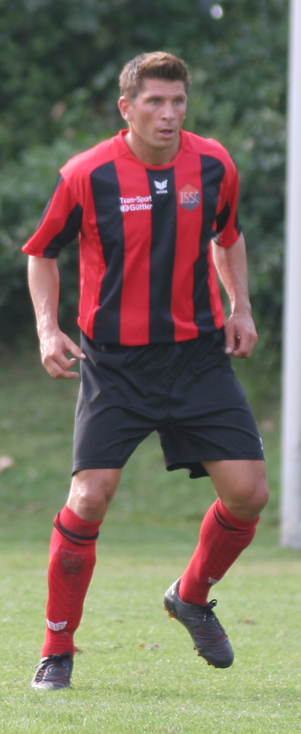 Marcus Pürk